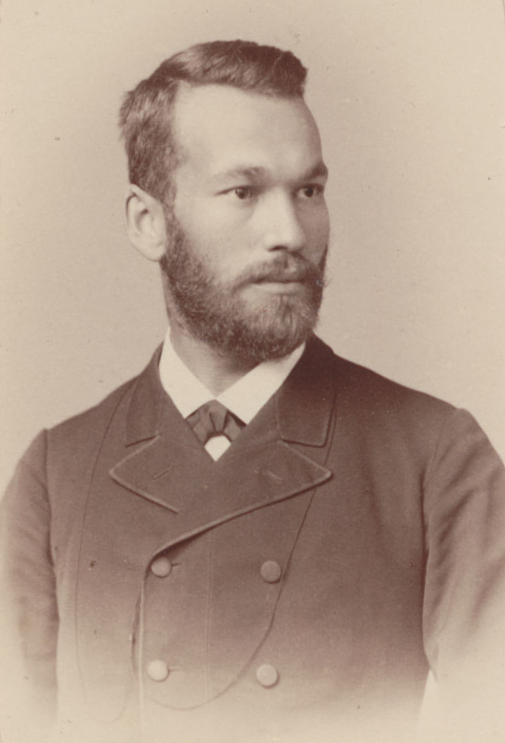 Christian Friedrich Seybold auf Foto von Hermann Brandseph (Universitäts-Bibliothek Tübingen L XV 483-2) Unter dem Visitfoto auf dem Untersatzkarton Angaben zum Fotografen: H. Brandseph Stuttgart Unter der Papierrahmung handschriftlich der Name des Dargestellten und Datum: Seybold, Christian, 6.II.94